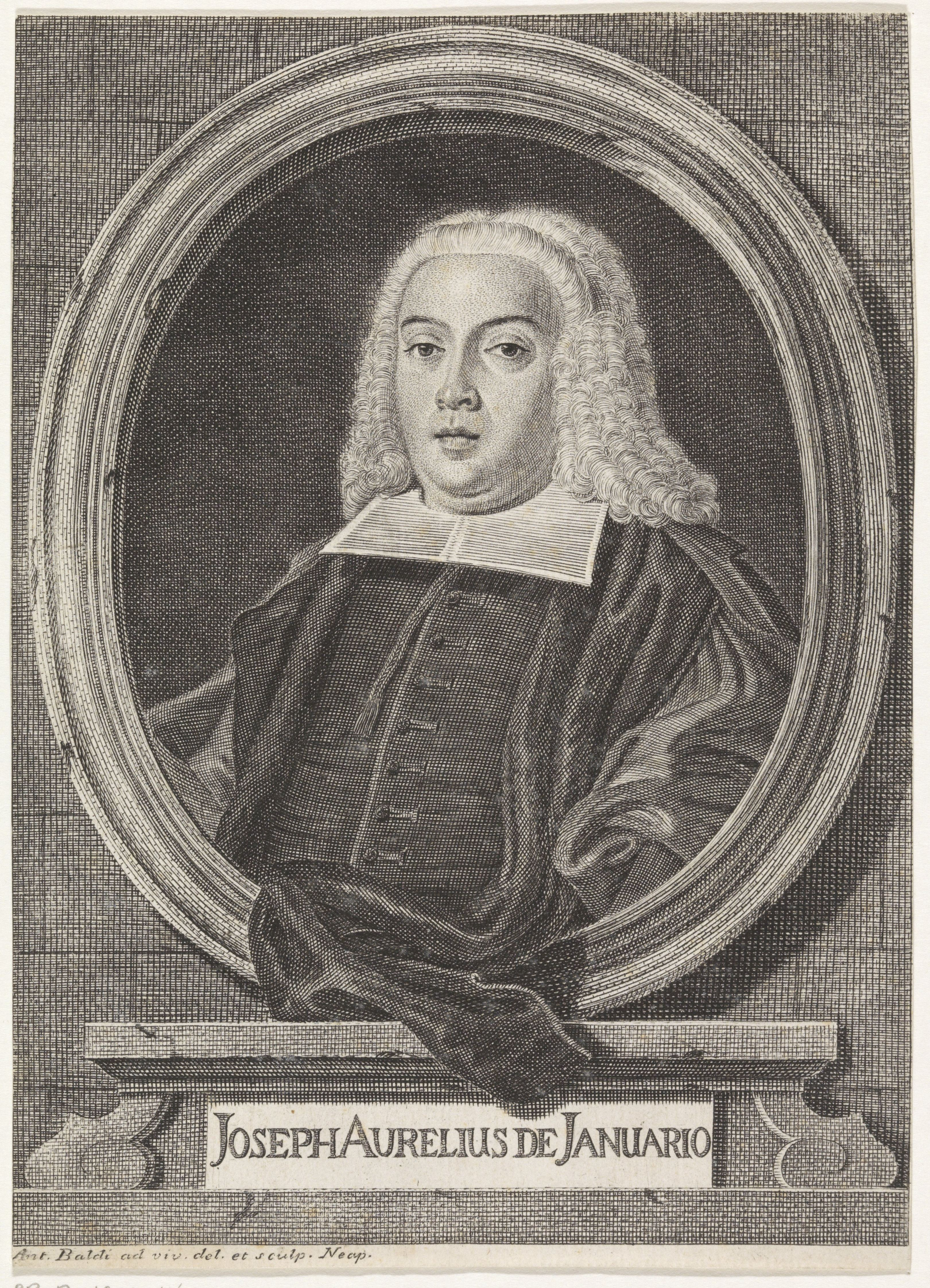 IdentificatieTitel(s): Portret van Giuseppe Aurelio di GennaroObjecttype: prent Objectnummer: RP-P-1909-4699Opschriften / Merken: verzamelaarsmerk, verso, gestempeld: Lugt 2228Omschrijving: Portret van advocaat, jurist en dichter Giuseppe Aurelio di Gennaro.VervaardigingVervaardiger: prentmaker: Antonio Baldi (vermeld op object)naar ontwerp van: Antonio Baldi (vermeld op object)Plaats vervaardiging: NapelsDatering: 1702 - 1773Fysieke kenmerken: gravureMateriaal: papier Techniek: graveren (drukprocedé)Afmetingen: blad: h 204 mm (Binnen plaatrand afgesneden.) × b 146 mm (Binnen plaatrand afgesneden.)OnderwerpWat: historical personsWie: Giuseppe Aurelio di GennaroVerwerving en rechtenVerwerving: aankoop 1905Copyright: Publiek domein